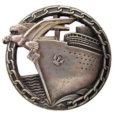 German Blockade Runner Badge from 1941